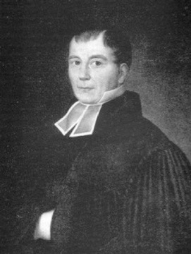 Porträt des ersten Pfarrers an der neuen Evangelischen Kirche zu Monschau (1789-1840); entnommen aus: Walter Scheibler: Geschichte der Evangelischen Gemeinde Monschau, Aachen 1939, S. 251.